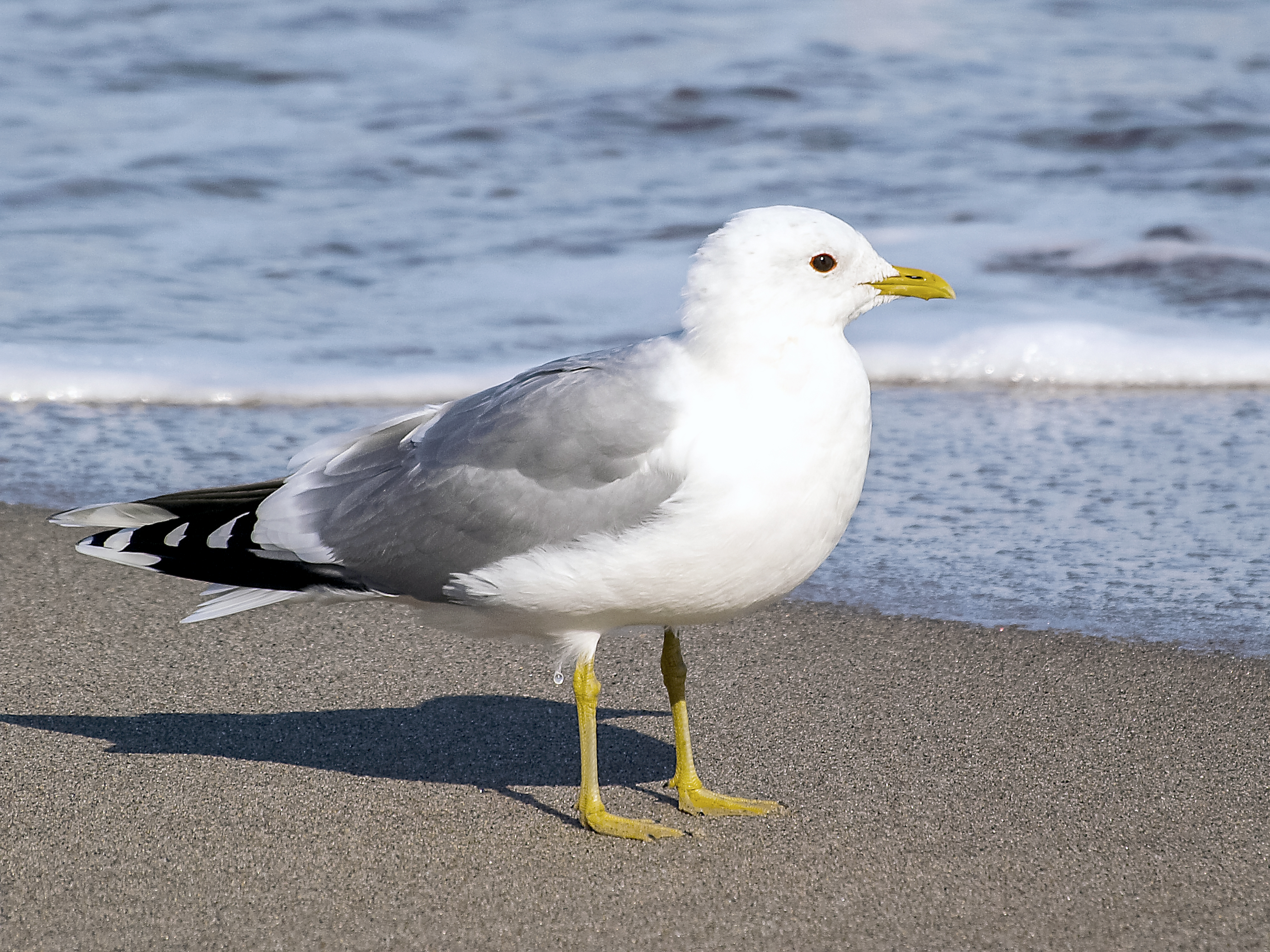 Sturmmöwe (Larus canus) im Naturschutzgebiet „Auenlandschaft Hohenrode“ (NSG HA 222) in Rinteln, Landkreis Schaumburg